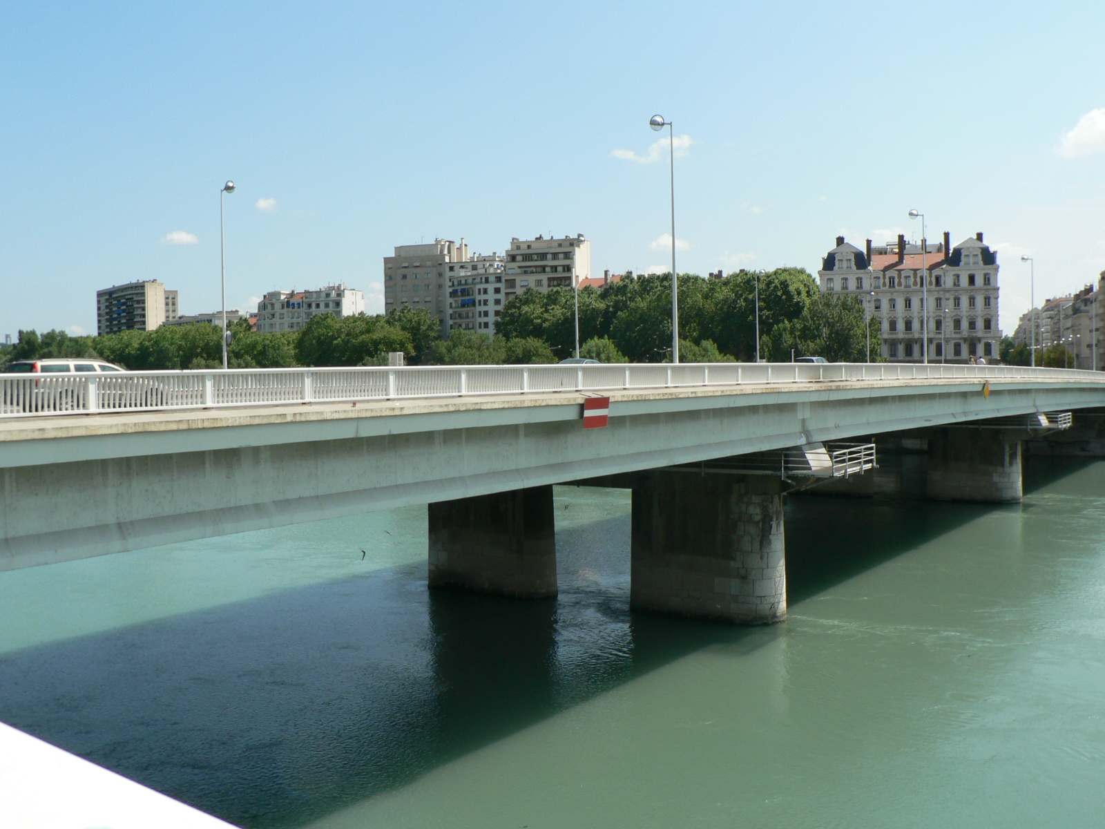 Ponts de Lyon – Pont de Lattre de Tassigny